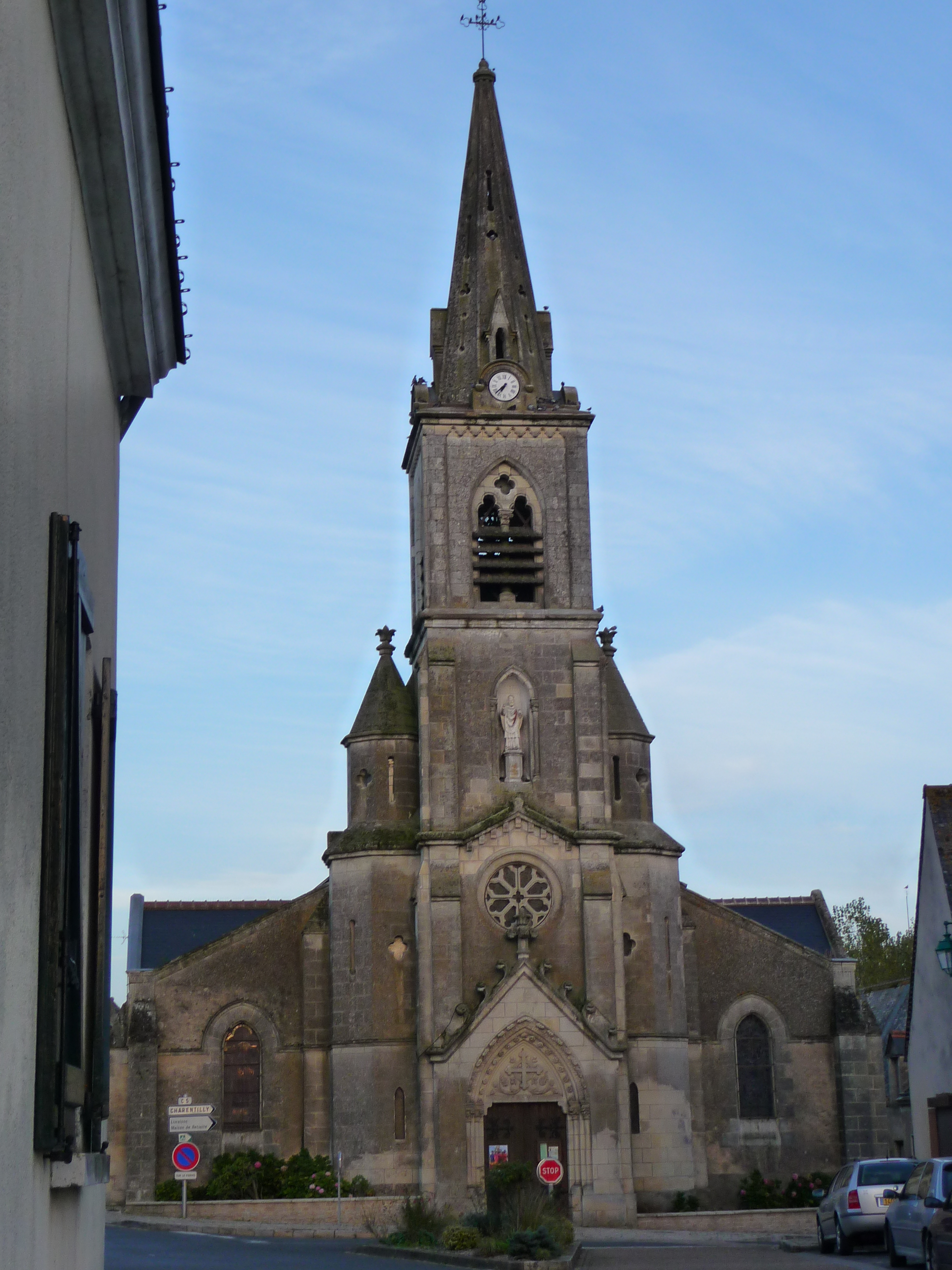 Clocher Église de Semblançay .